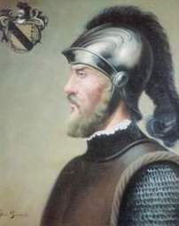 Retrato del conquistador Español